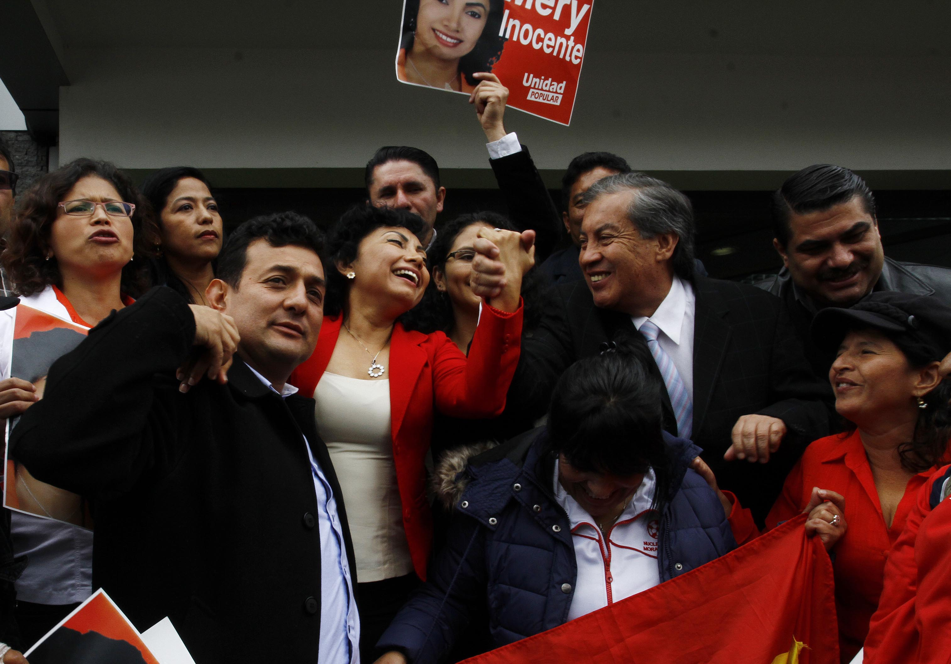 Quito, 10 feb (ANDES).- Esta mañana los jueces de la corte Constitucional analizaron el caso Mery Zamora. A las afueras del edificio varios simpatizantes demostraron con pancartas su apoyo a la dirigente de los maestros. Foto: Micaela Ayala V./ANDES